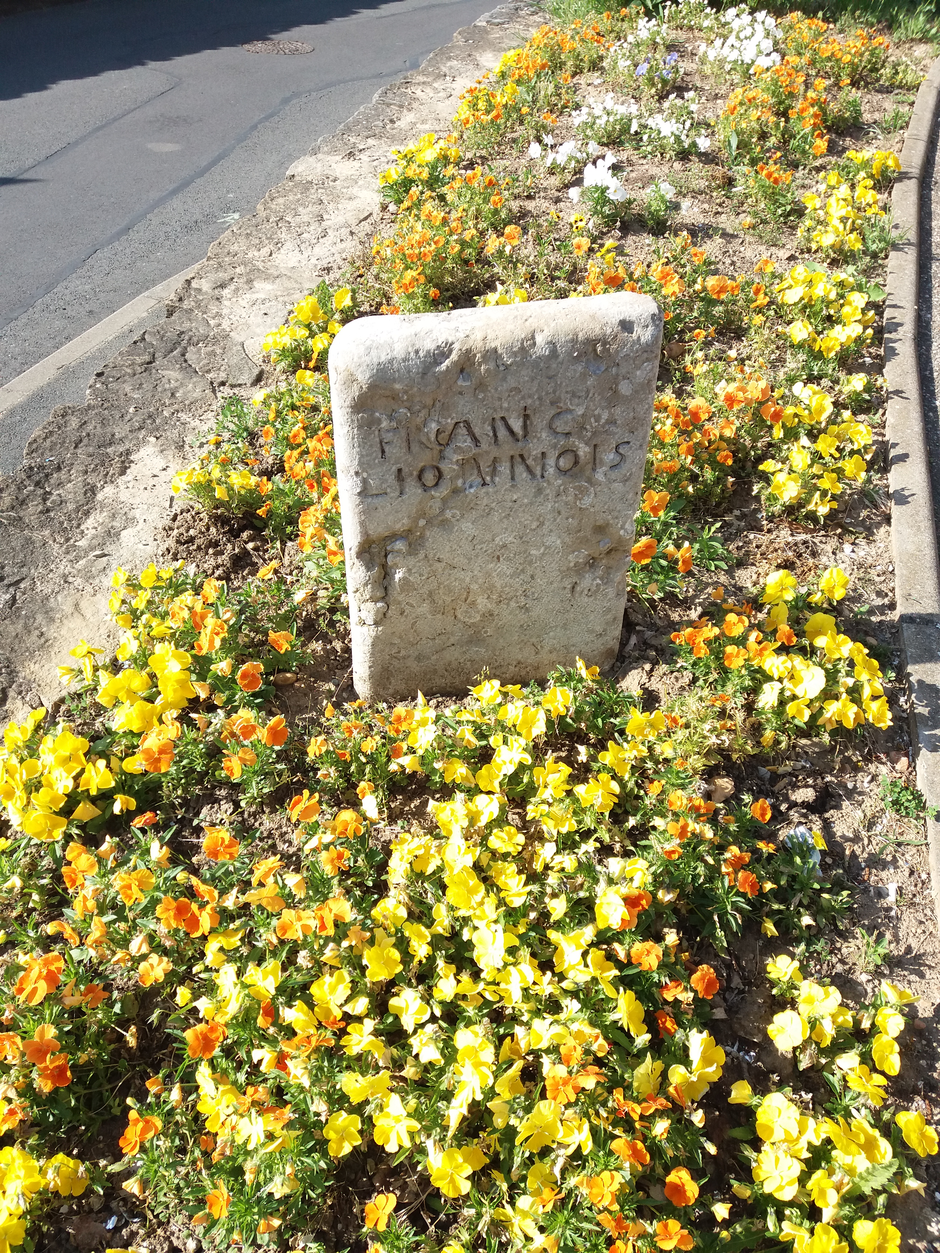 Borne du Franc-Lyonnais côté face.